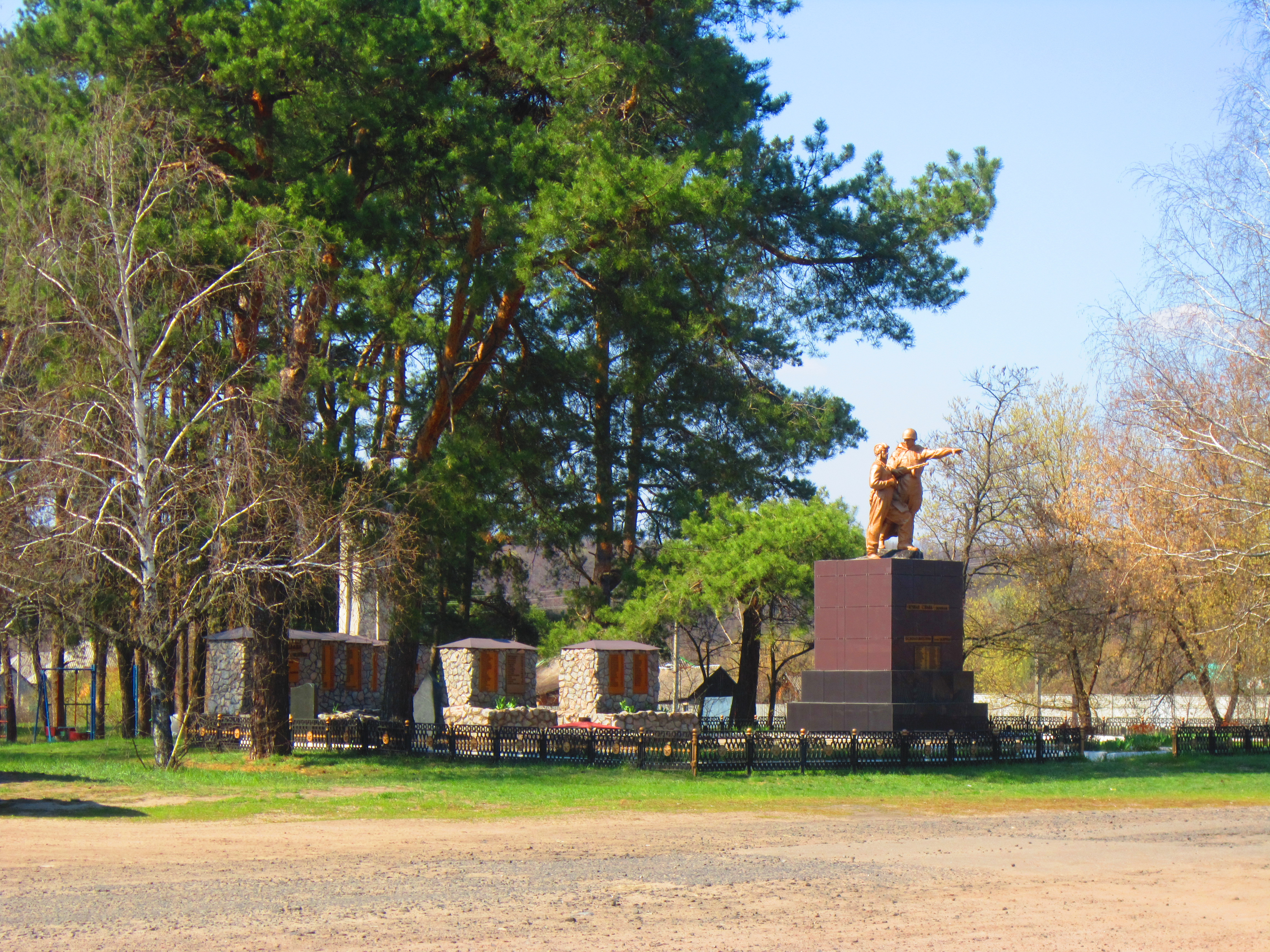 Братська могила радянських воїнів. Поховано 30 воїнів., Безруки